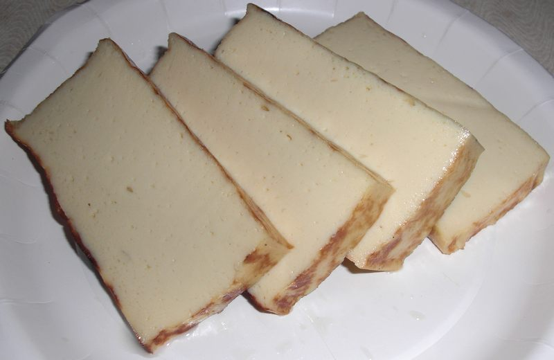 Tofu-castella (豆腐カステラ)